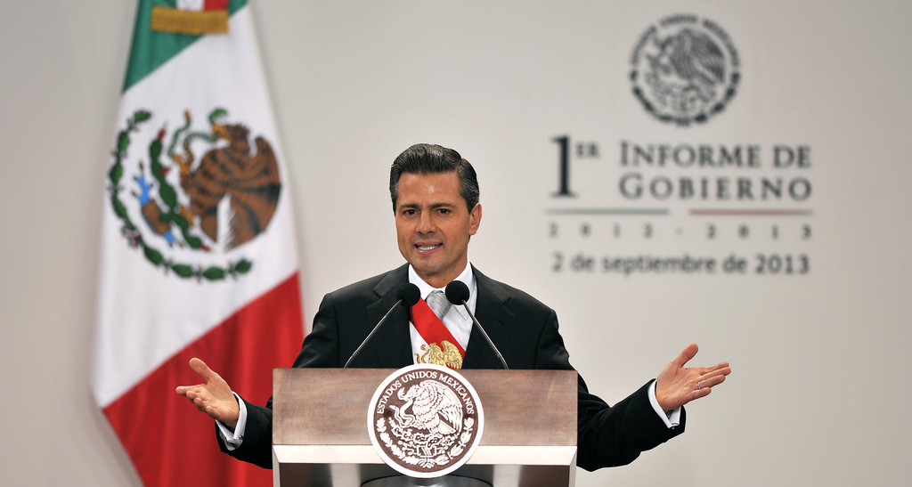 Enrique Peña Nieto. 1er. Informe de Gobierno. Residencia Oficial de los Pinos, Ciudad de México. 02 de septiembre de 2013.